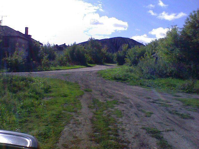 Шахта № 3